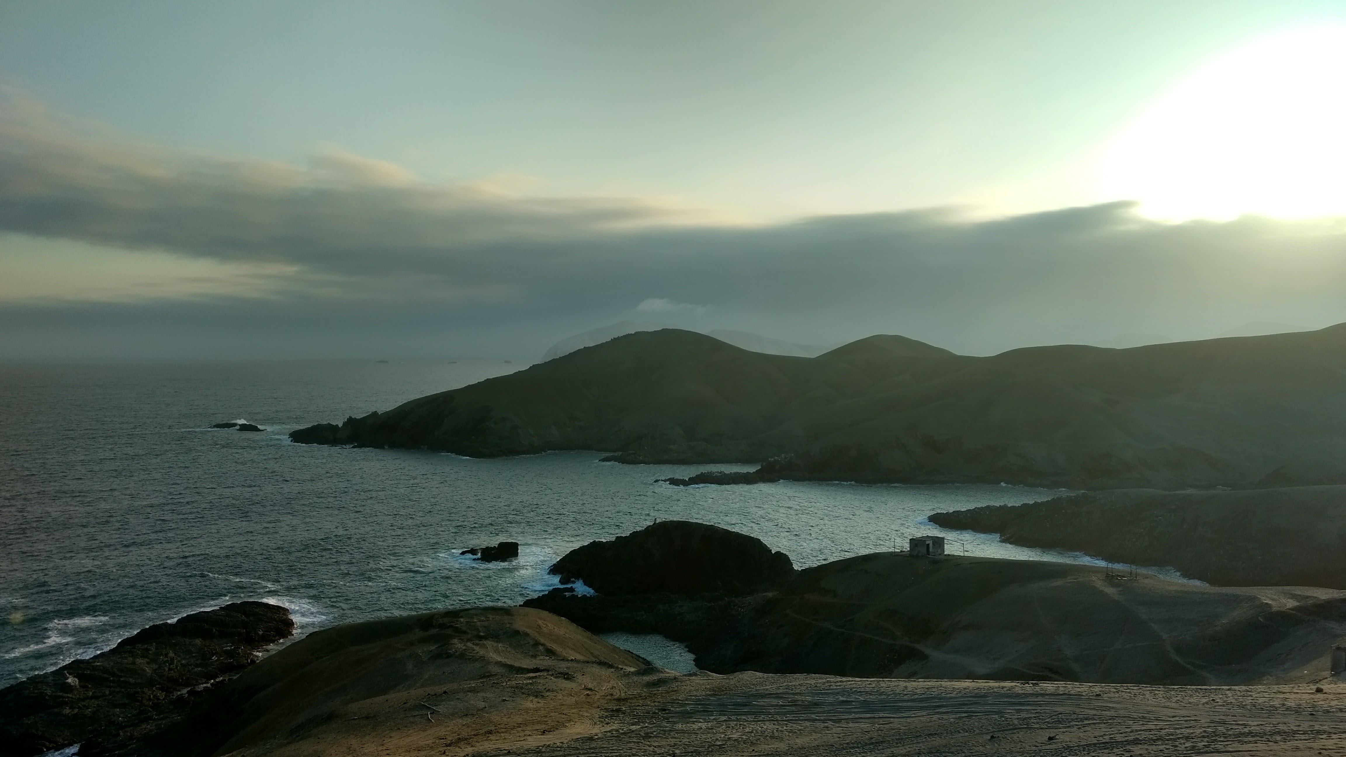 PLAYA QUITA CALZÓN ES UNA PLAYA CASMEÑA MUY CONCURRIDA POR PESCADORES CASMEÑOS. TIENE MUY HERMSOS ATARDECERES.